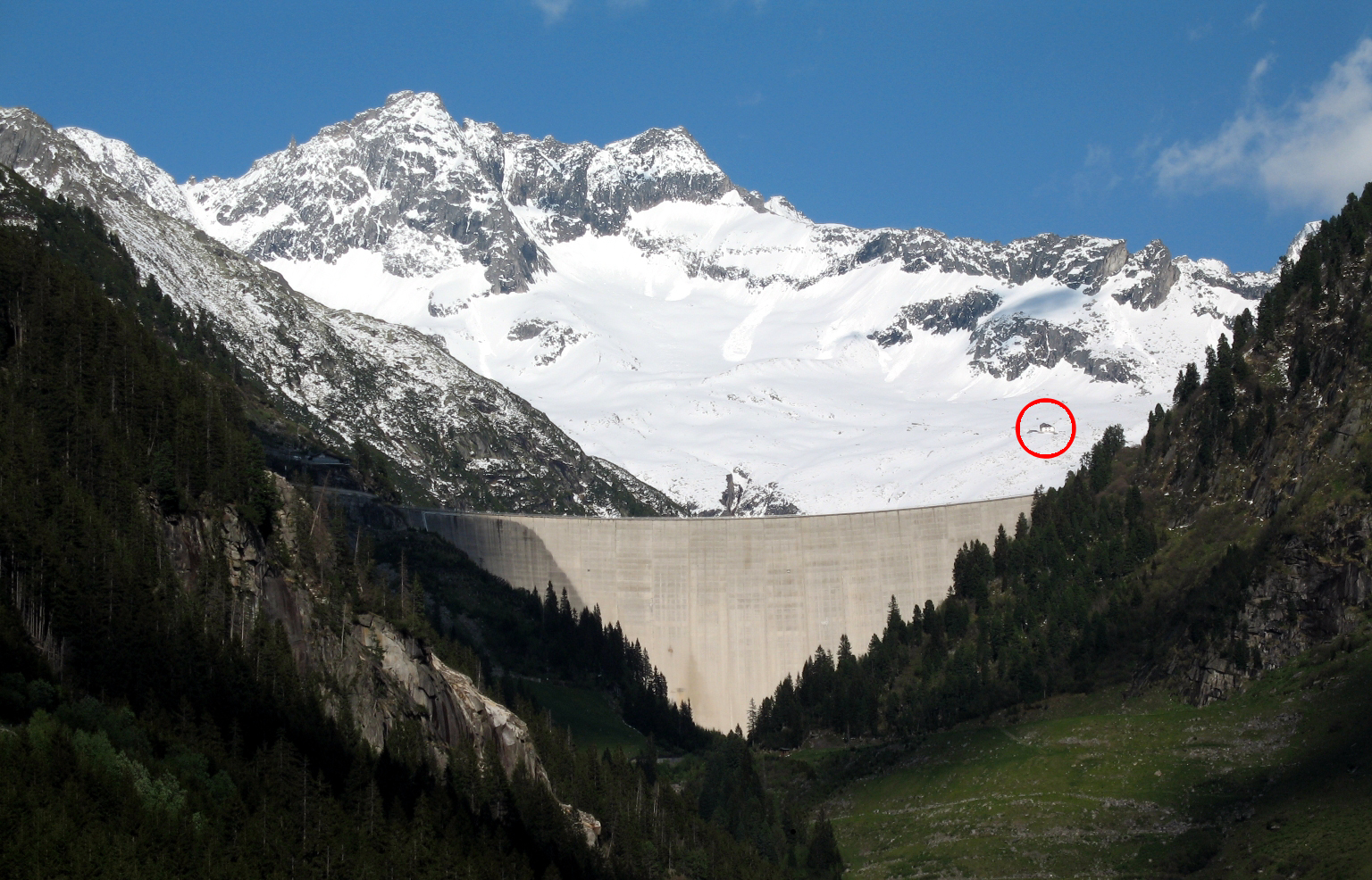 Staumauer des Staudammes Zillergründl in Tirol. Ansicht von Westen. Über dem rechten Ende der Staumauer die Plauener Hütte (im roten Kreis), dahinter die Westseite der Reichenspitzgruppe mit (v.l.n.r) Gamsscharte (2972m), Finger (markante Felsformation), Nördlicher Schwarzkopf (3082m/3079m), Südlicher Schwarzkopf (3045m/3042m).